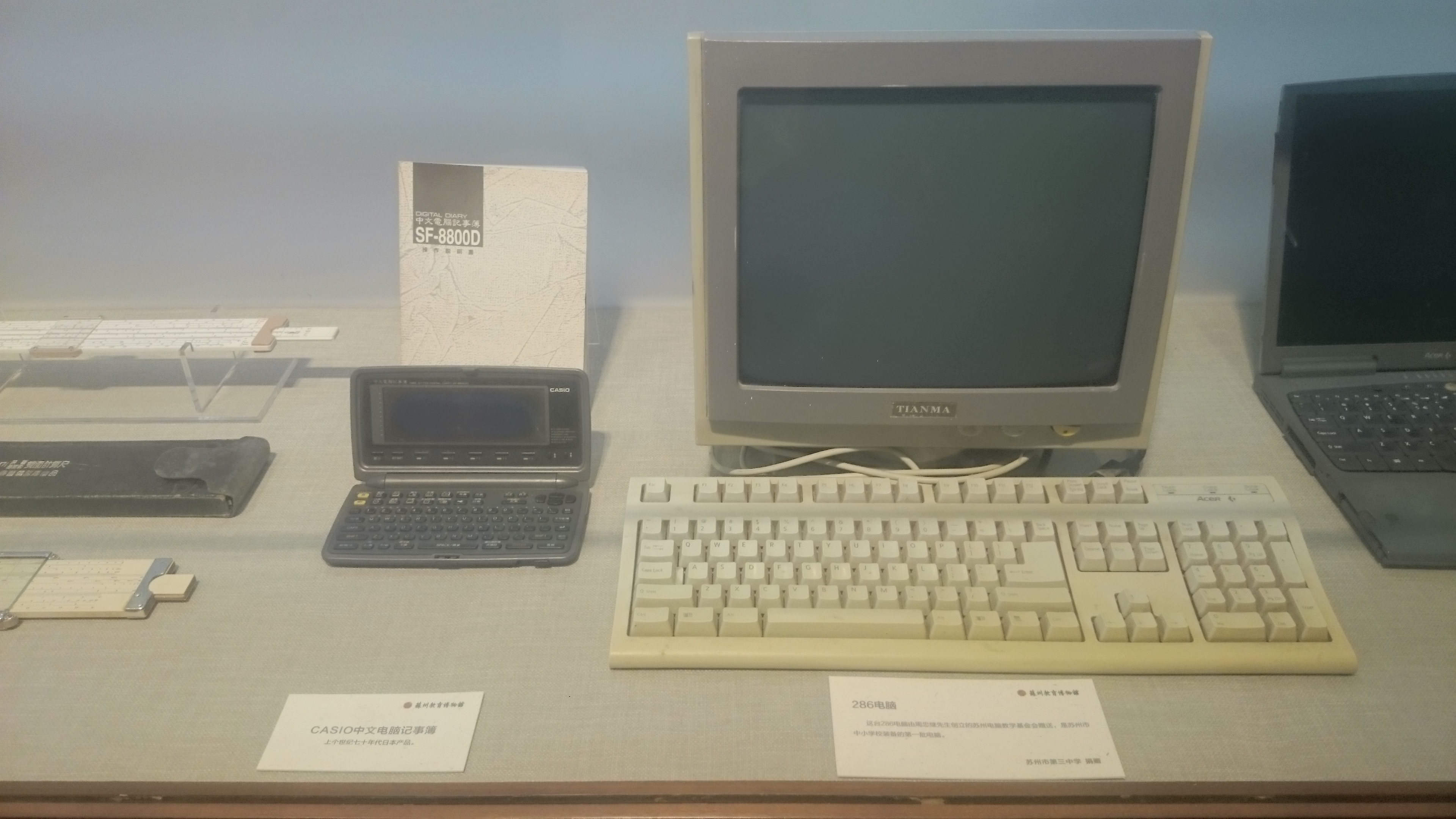 柴园 苏州教育博物馆 馆藏计算机